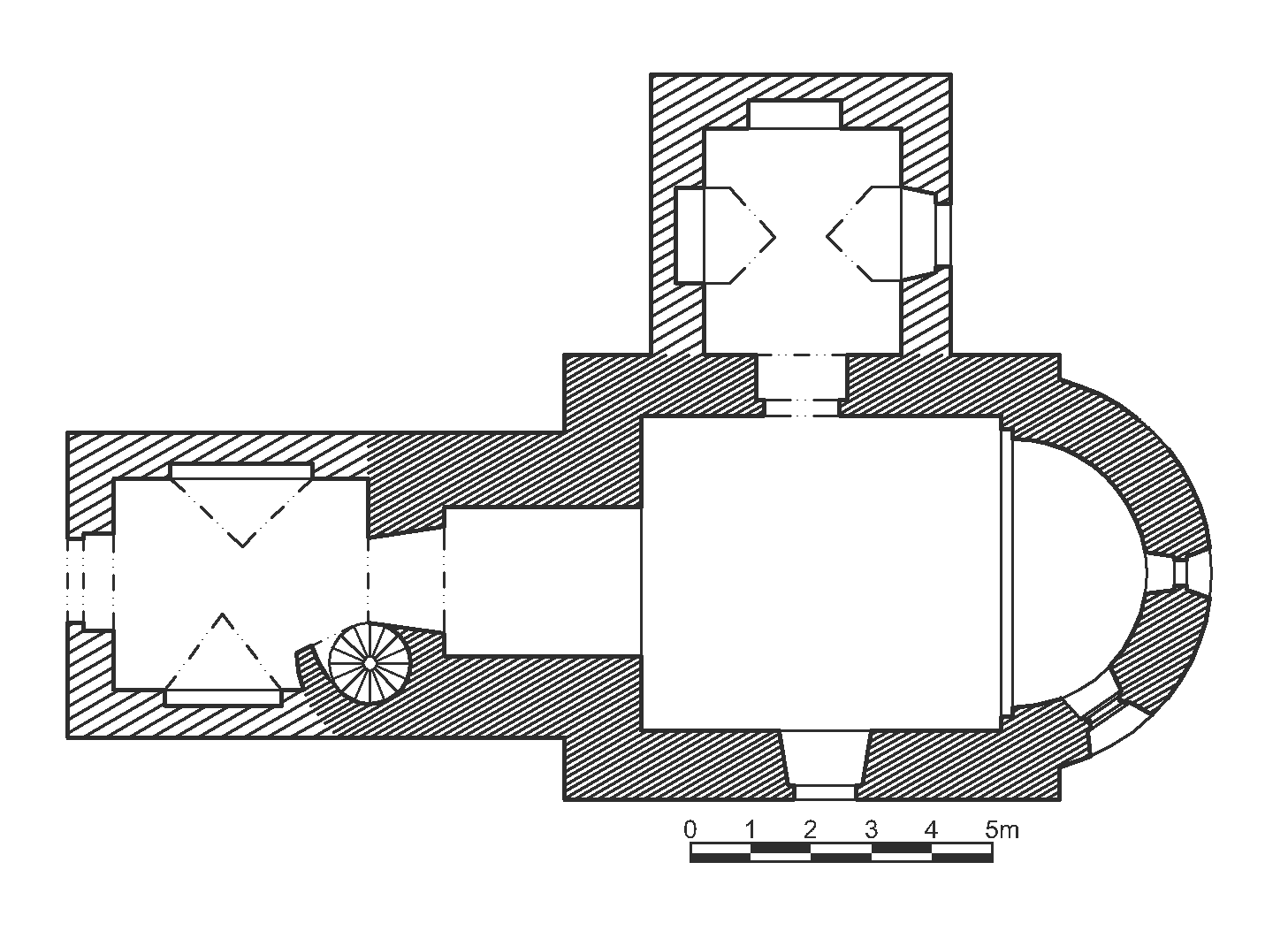 Kostel svatého Jakuba, Sázavská, st. 150, st. 151, pp. 282, Stříbrná Skalice. Půdorys kostela podle ilustrace v: Rovná (Rovný) - Kostel sv. Jakuba, Soupis památek, 24. Politický okres českobrodský (1907), str. 146-151, cit dle: (2014)